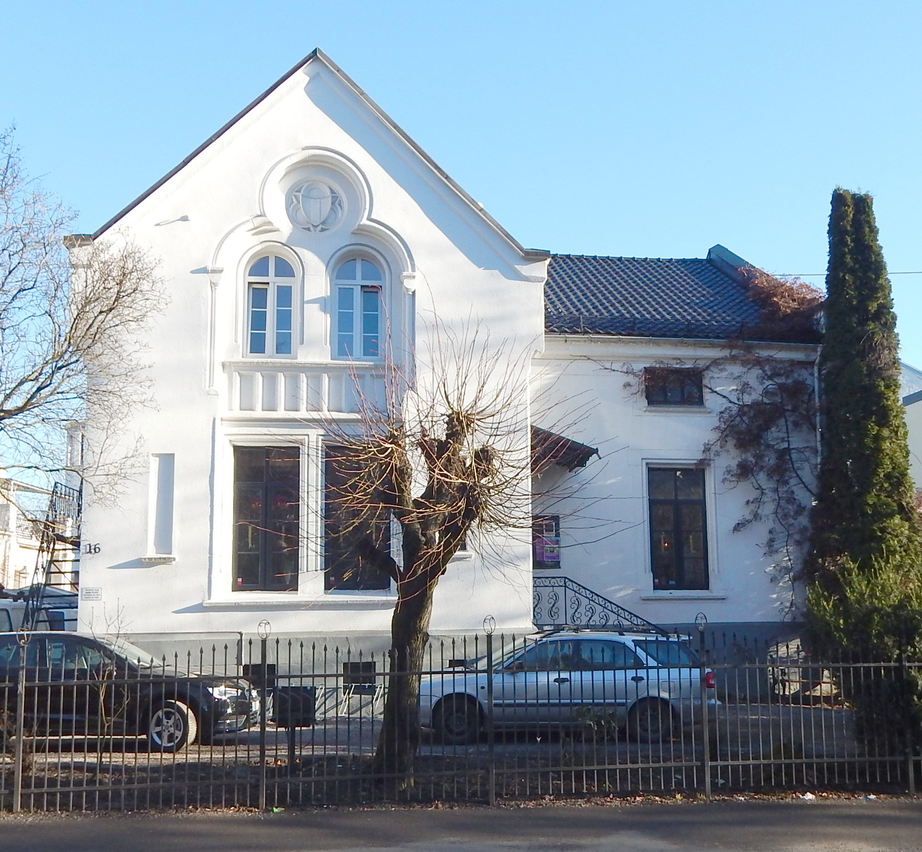 Josefines gate 16 (Josefine vertshus). Arkitekt: Wilhelm von Hanno (1867).